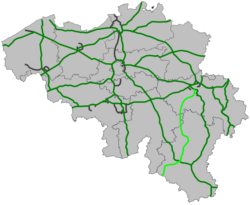 Traject Europese weg 46 door België